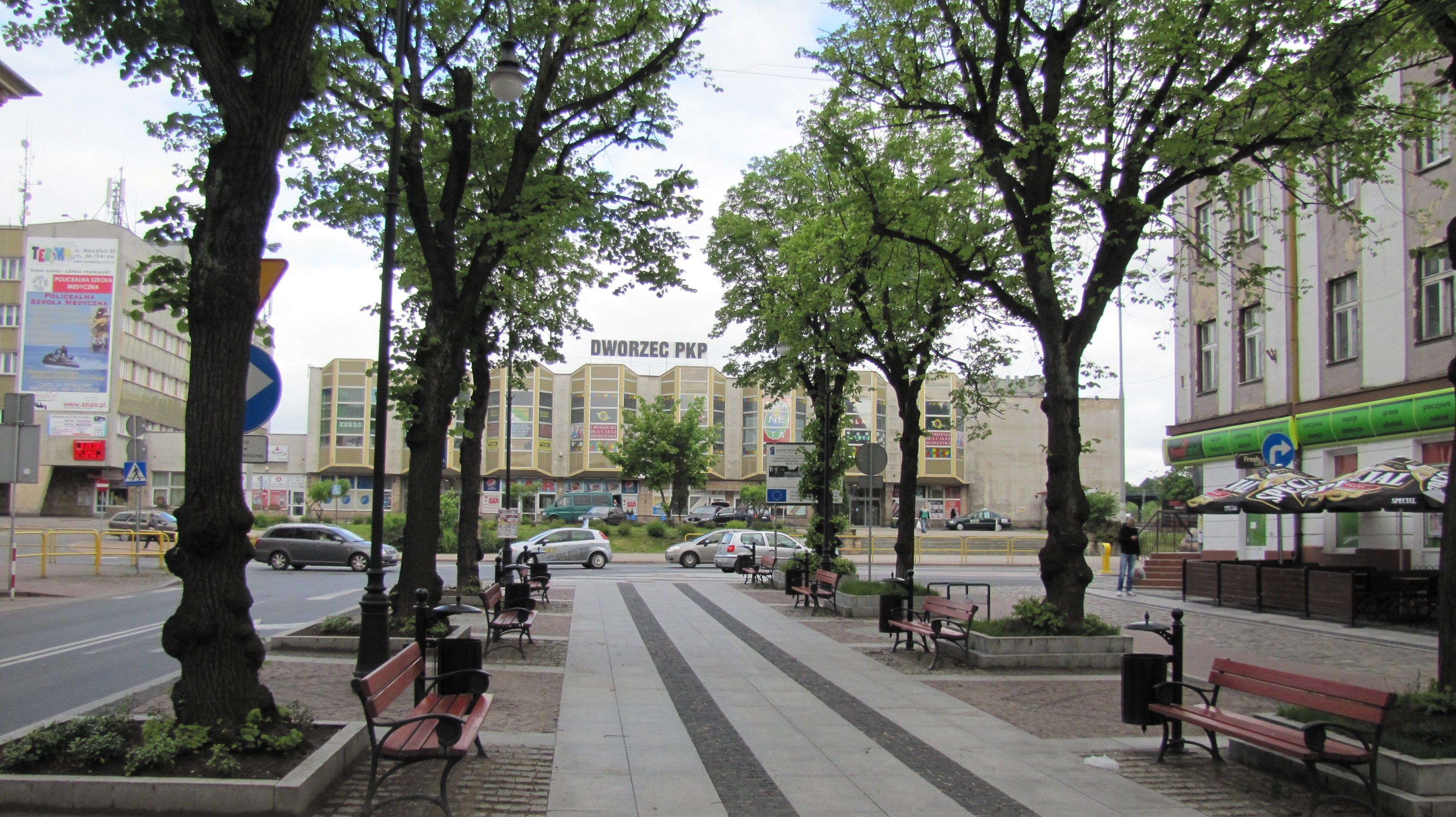 Dworzec PKP.